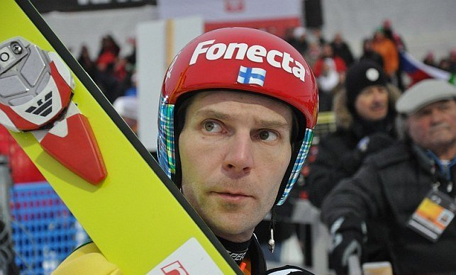 Janne Ahonen podczas konkursu drużynowego mężczyzn na skoczni normalnej podczas Mistrzostw Świata w Narciarstwie Klasycznym 2011 w Oslo.